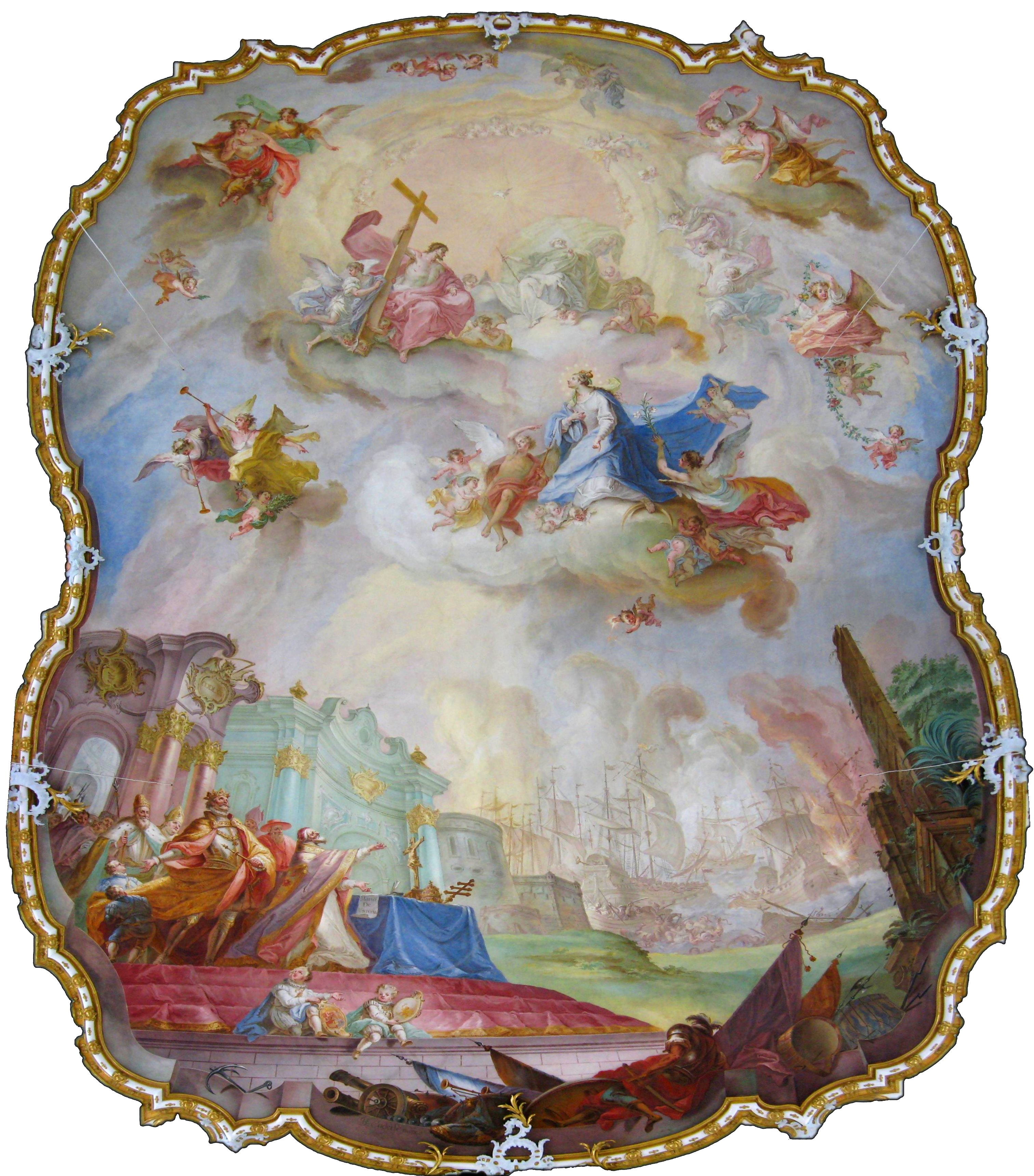 Kirche in Seeg, Decke. Hauptfresko von Enderle mit der Trinitätsszene